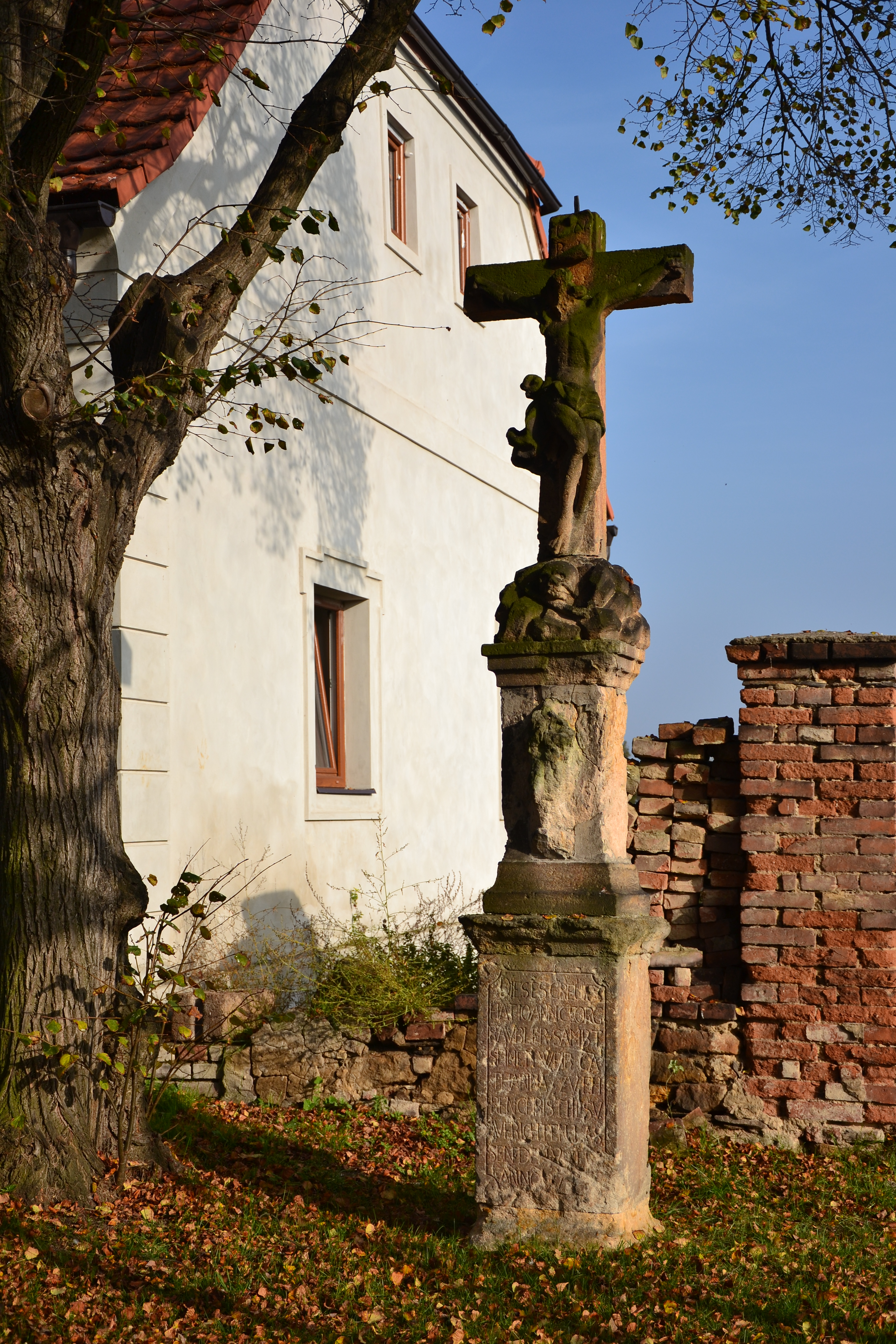 Kříž, Všestudy (okres Chomutov).